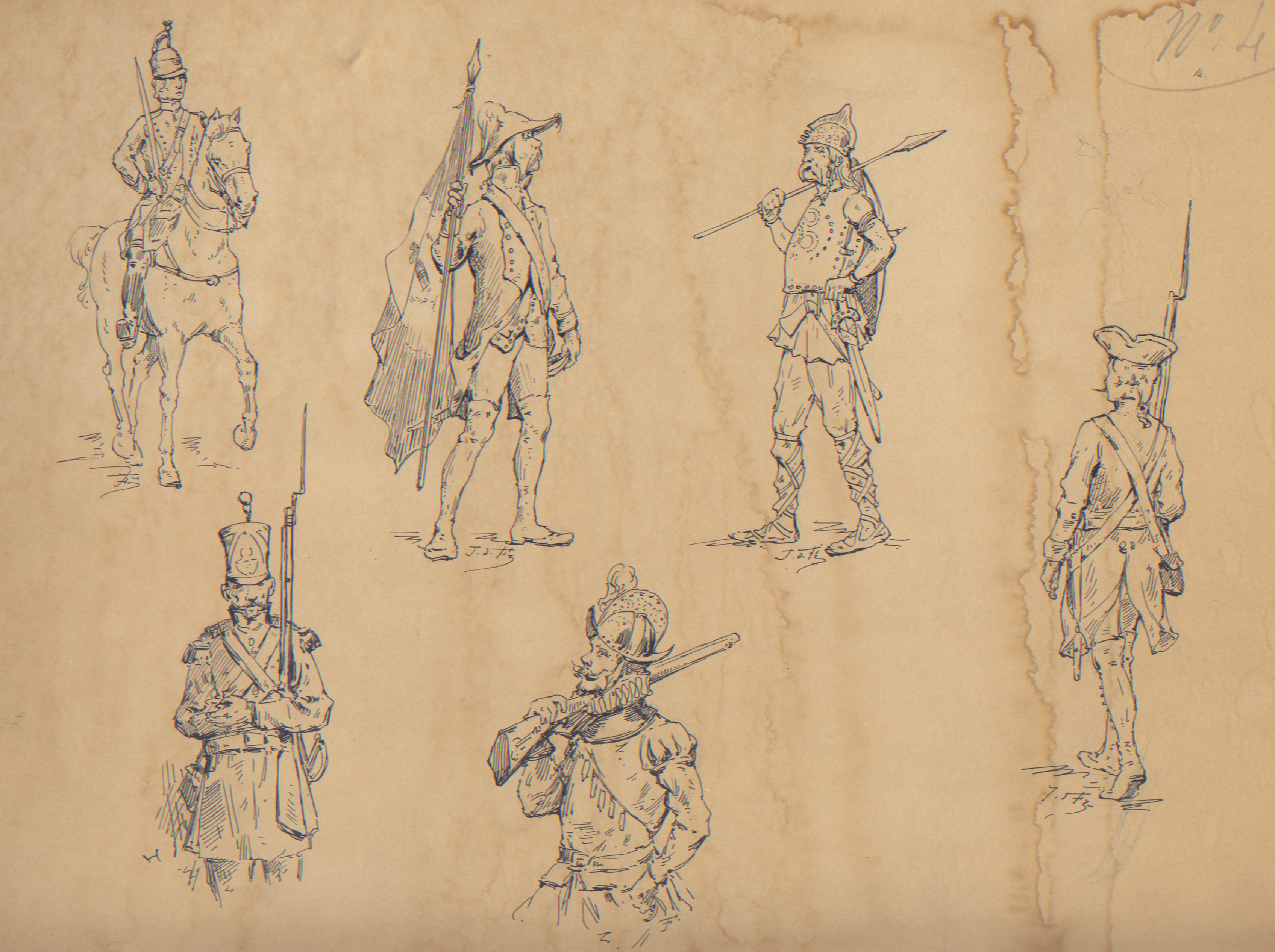 Personnages militaires au fil des siècles par Jean de Francqueville